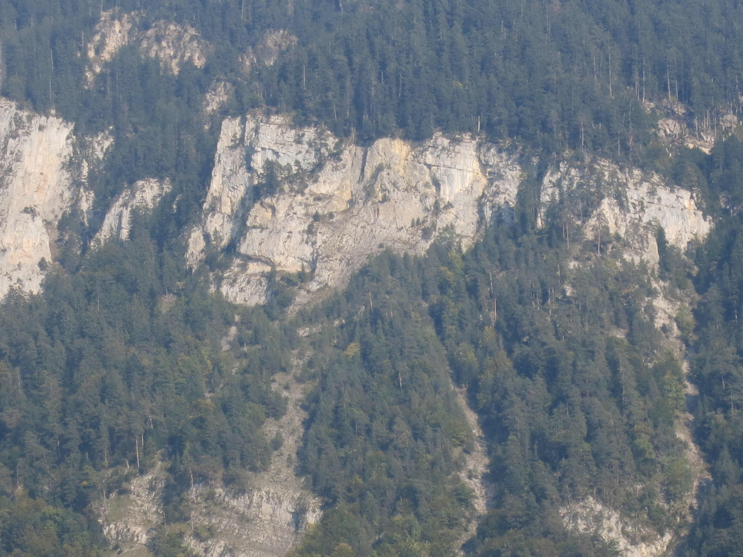 Artilleriewerk Legi, Beatenberg BE, Schweiz